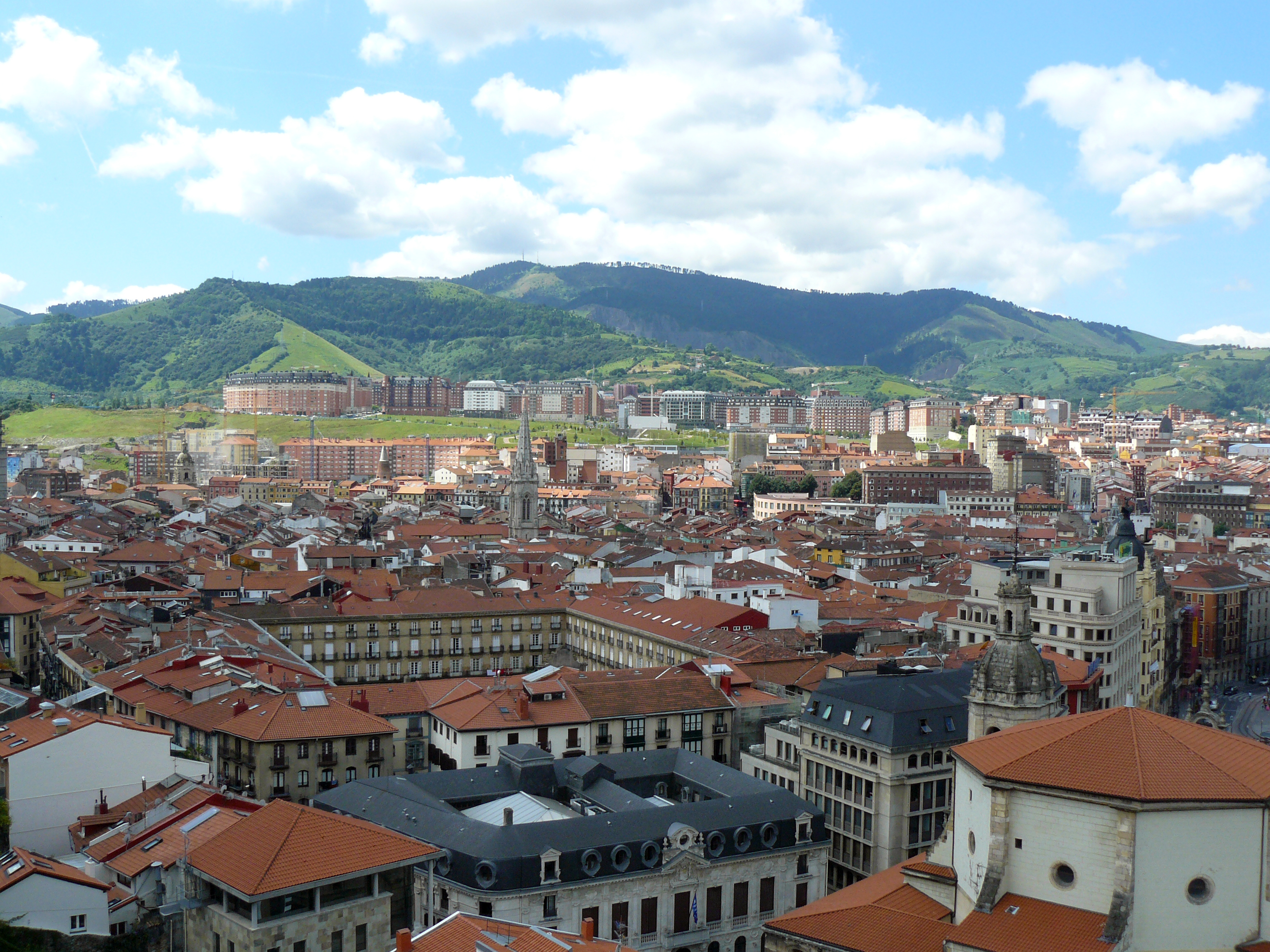 El casco viejo de Bilbao visto desde Begoña.